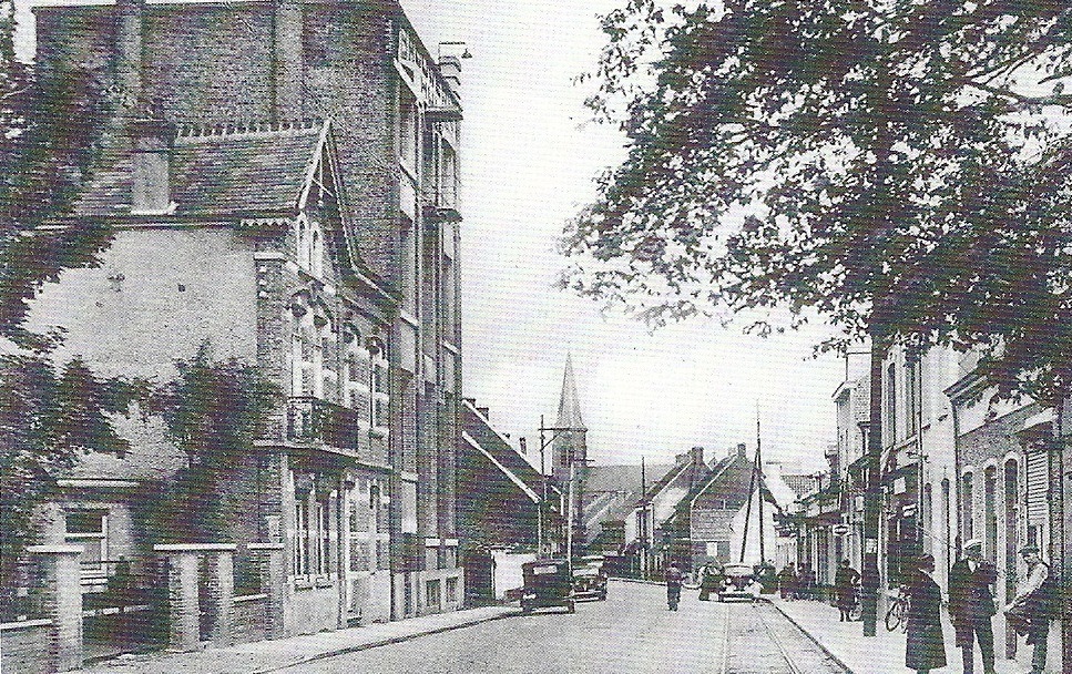 Brouwerij Hul, stond op de plaats waar nu de Colruyt is gevestigd - Hundelgemsesteenweg - Merelbeke - Oost-Vlaanderen - België